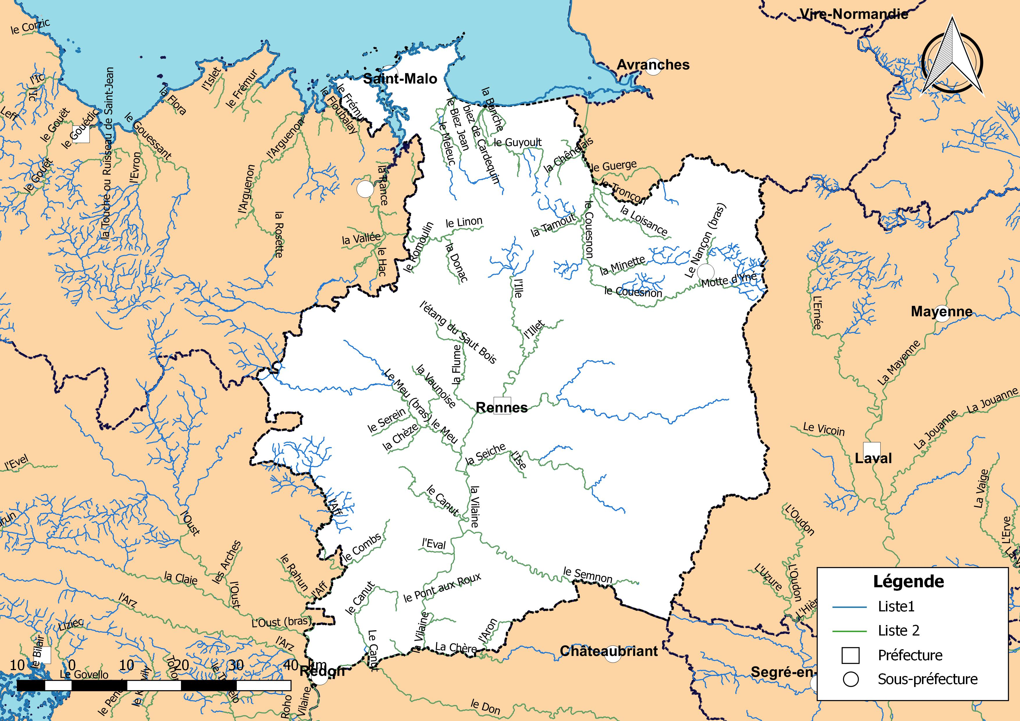 Classement des cours d'eau du département de l'Ille-et-Vilaine (France) au titre de la continuité écologique (article L214.17 I du Code de l'environnement).